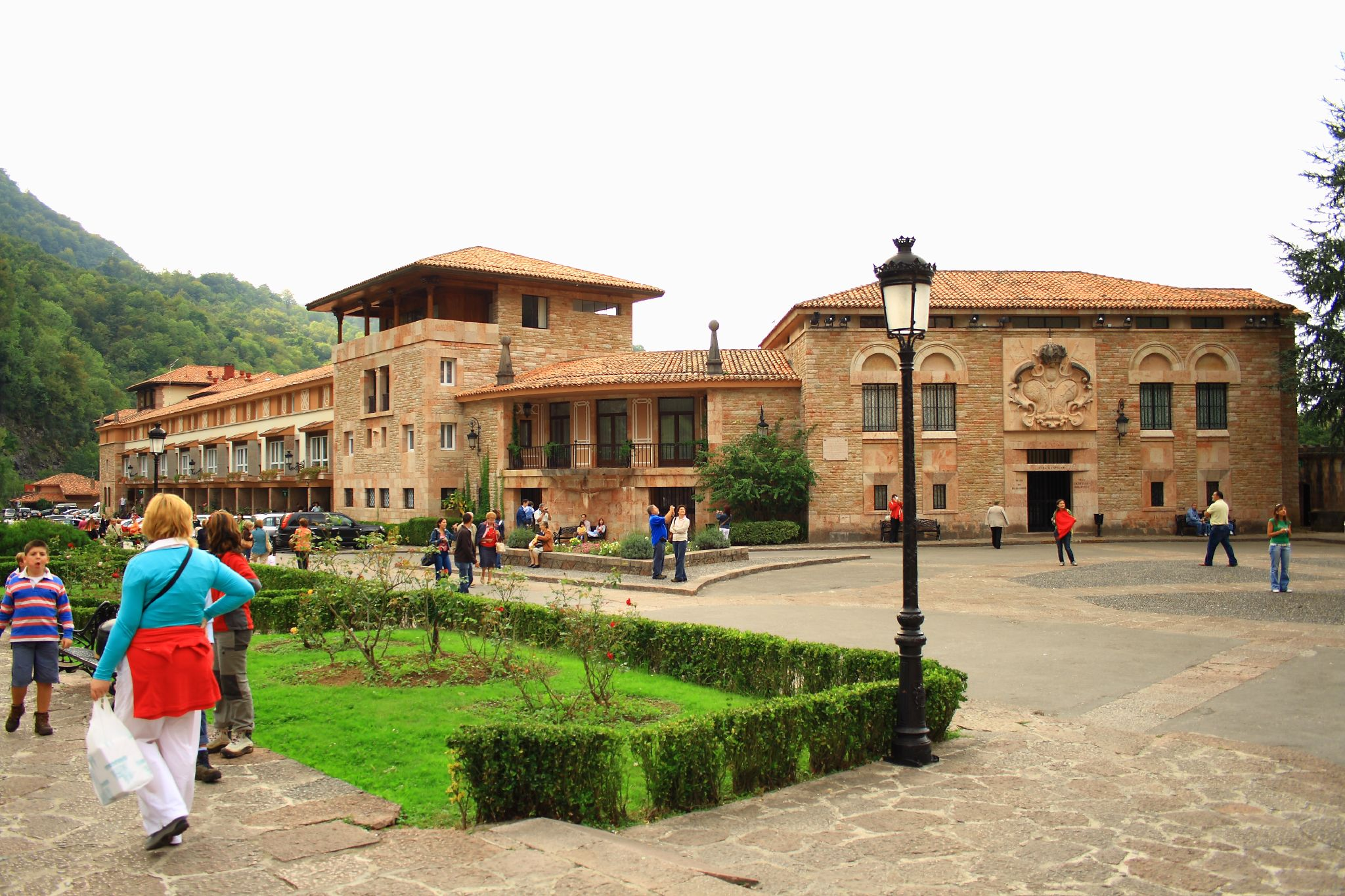 Vista de la plaza que hay frente a la Iglesia de Covadonga